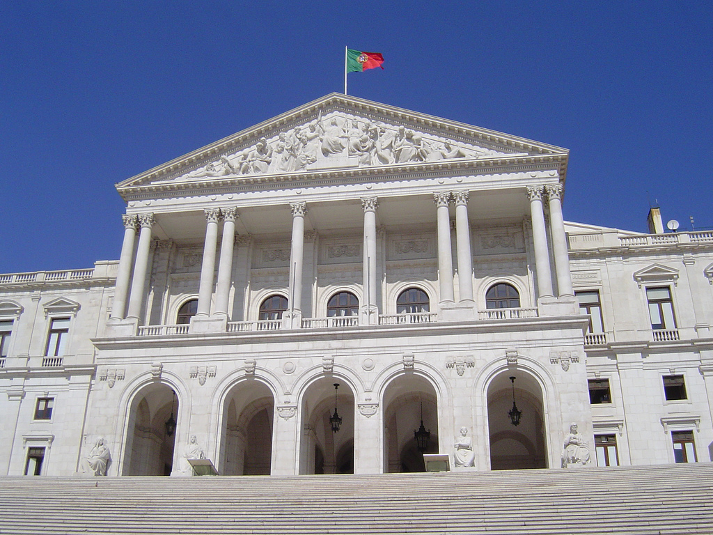 Palácio de São Bento, em Lisboa, Portugal.